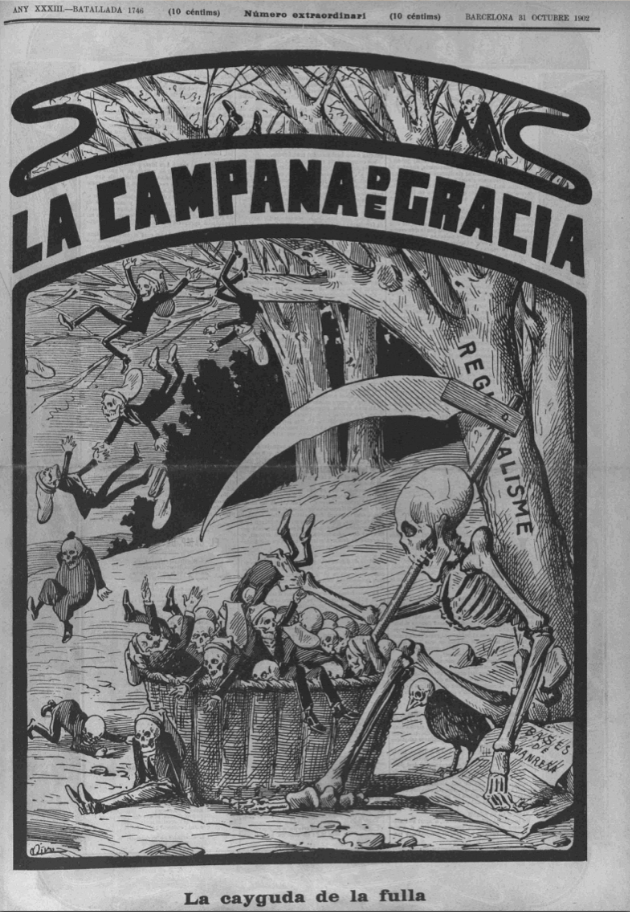 Portada de la campana de Gràcia